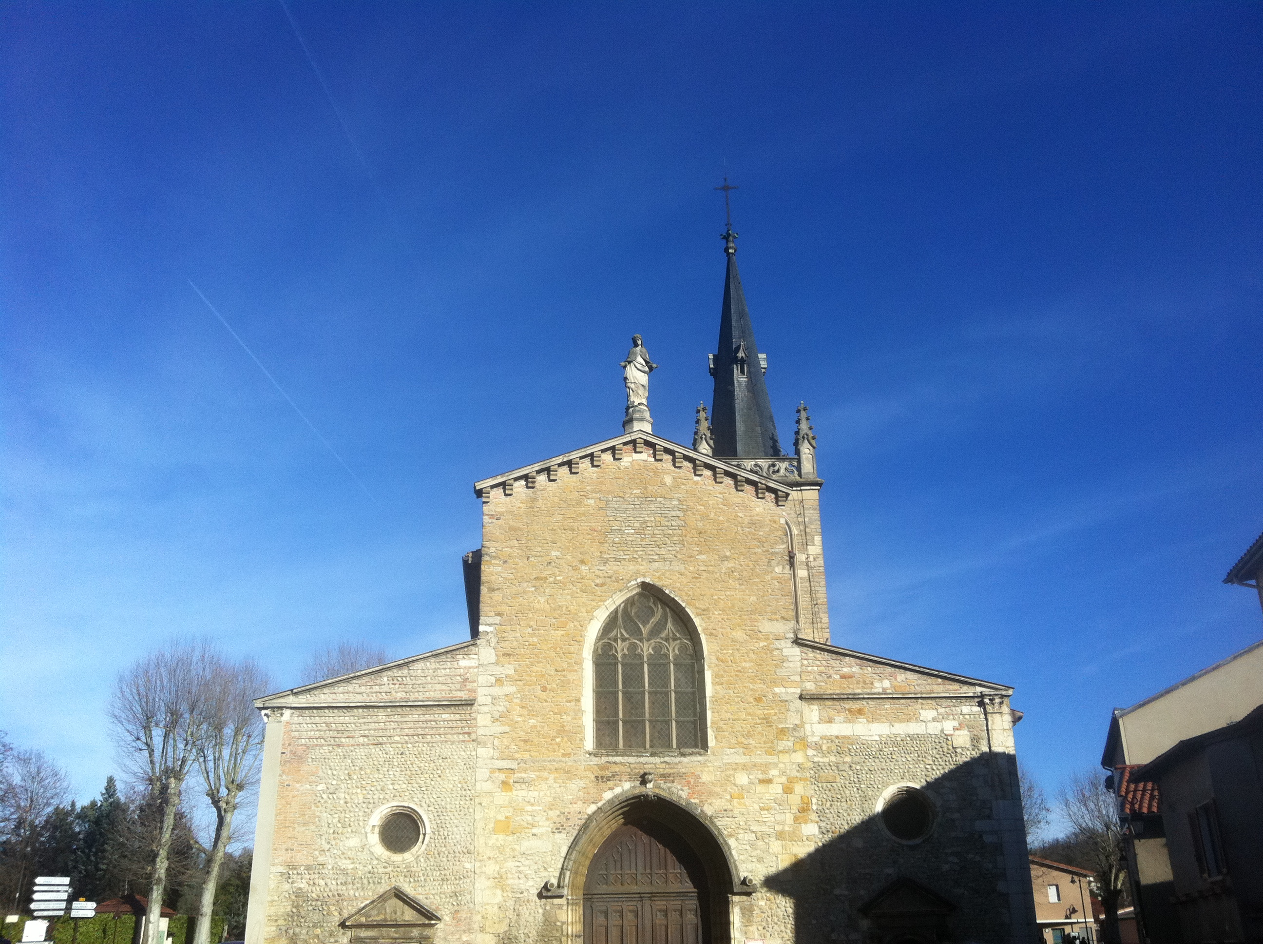 Notre-Dame-des-Marais de Montluel, porte sud.